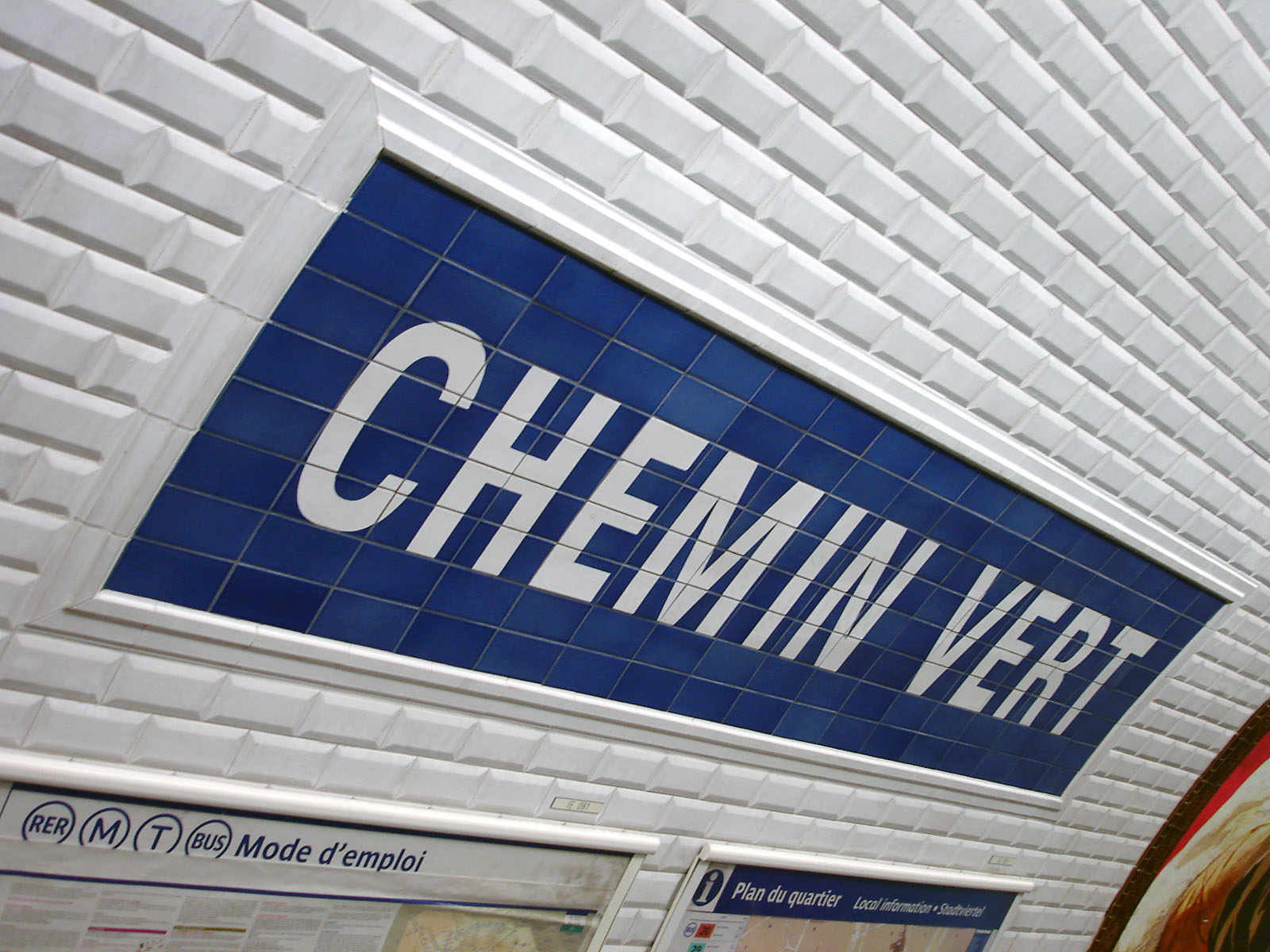 Panneau de la station Chemin Vert de la ligne 8 du métro de Paris, France